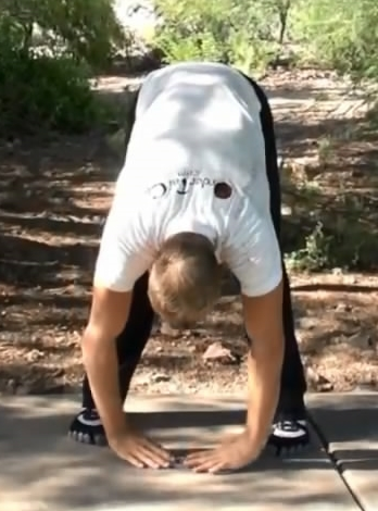 mengusap